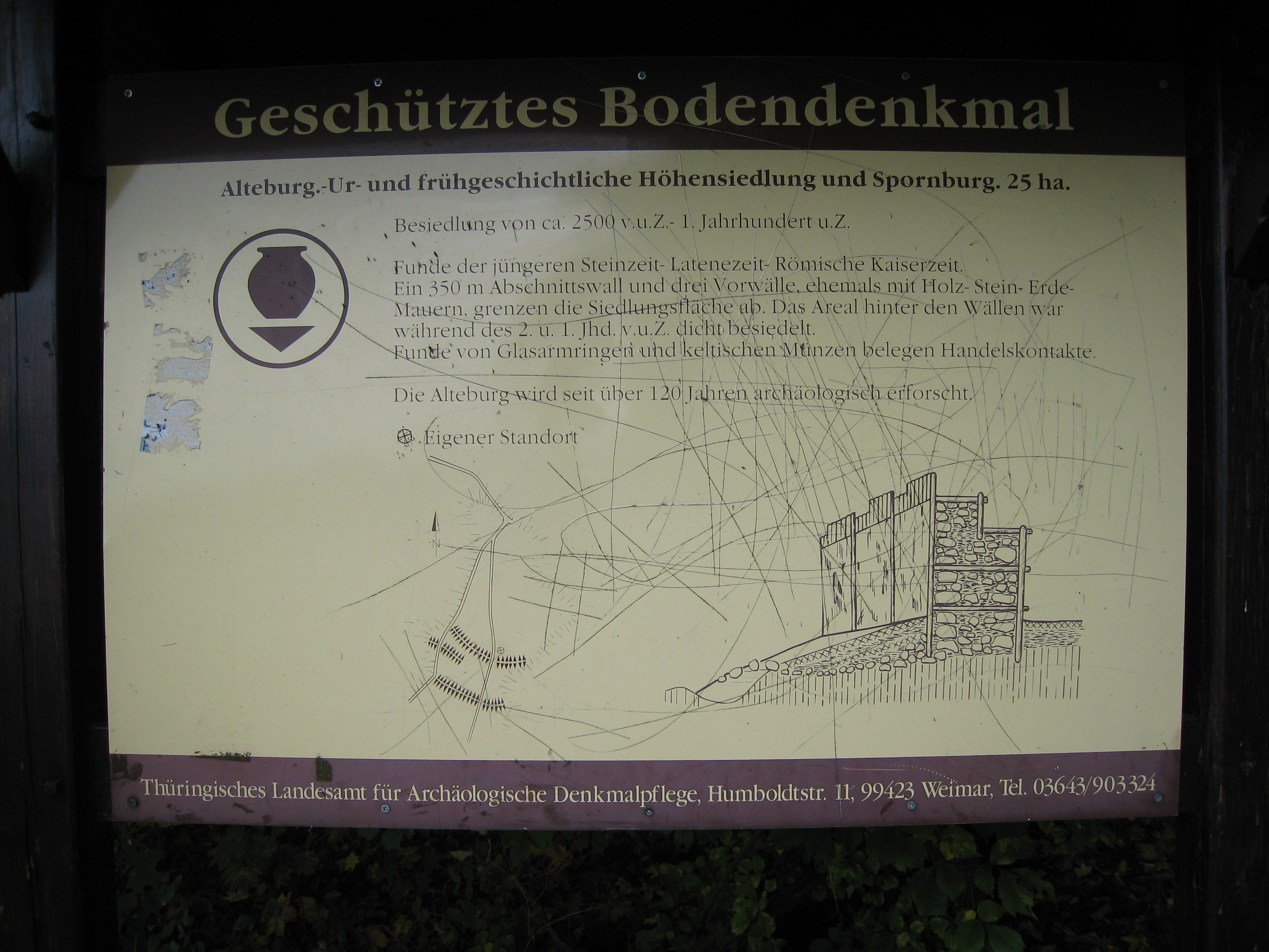 Alteburg Arnstadt 1